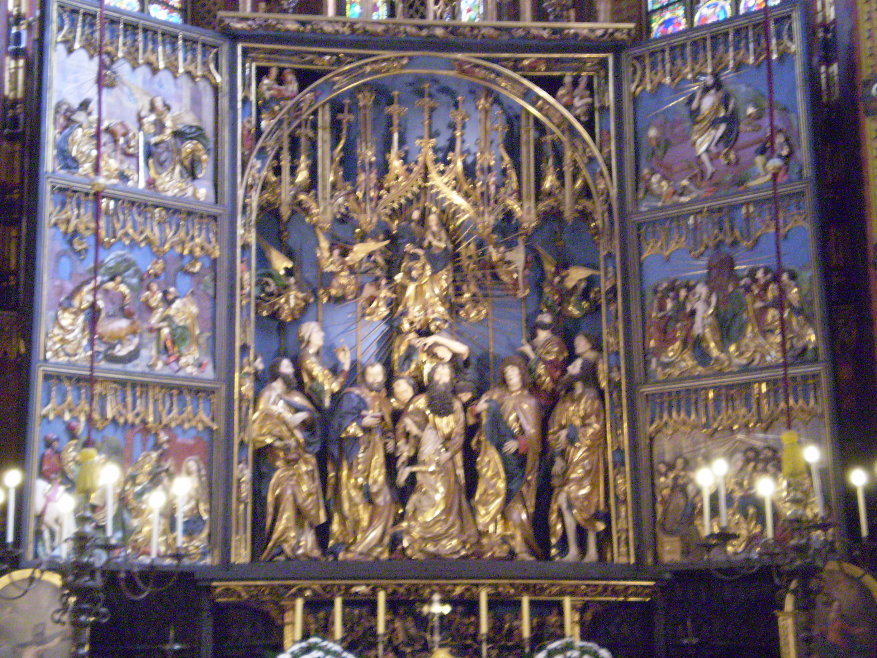 St. Mary in Kraków, Poland